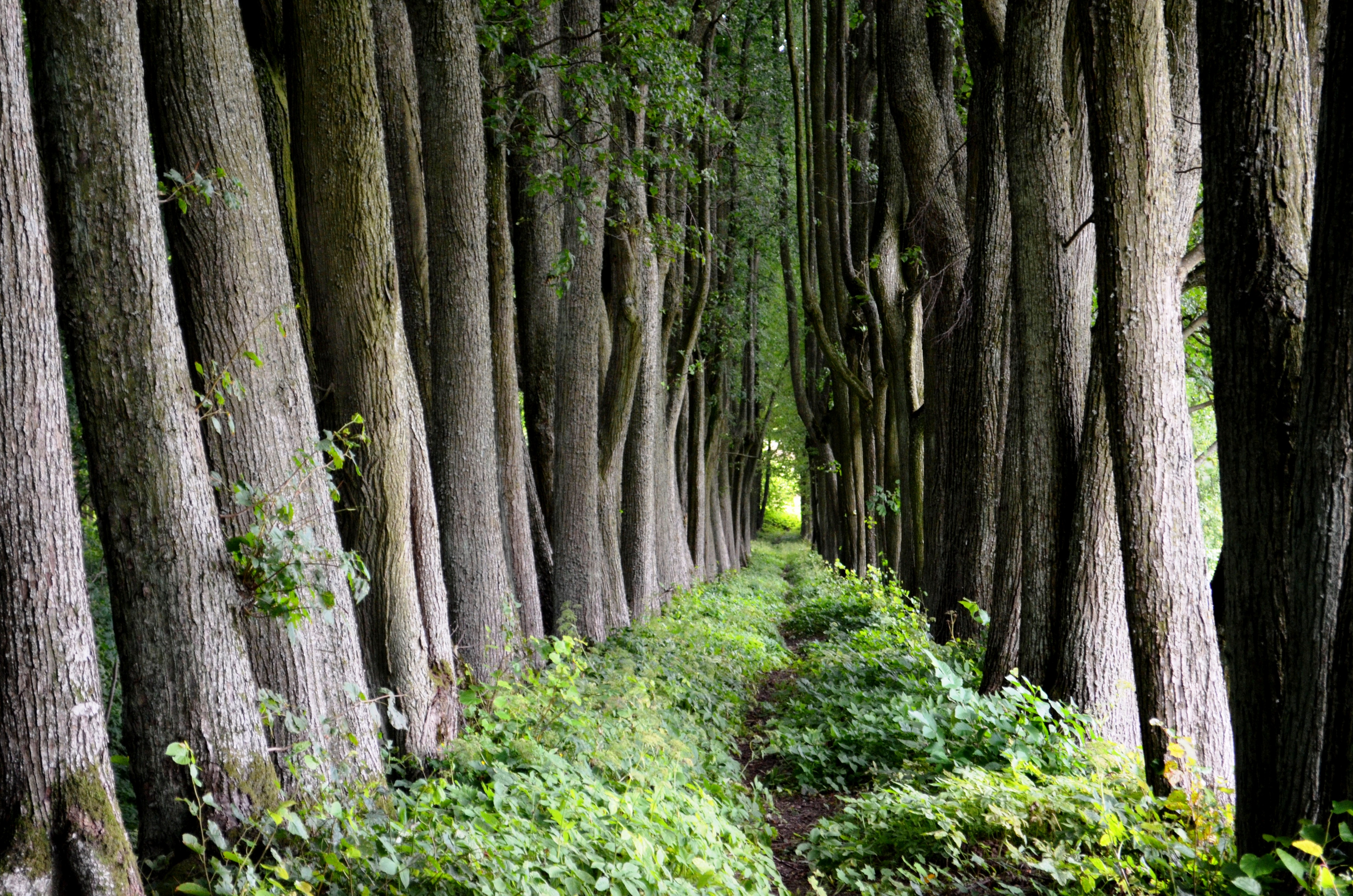 Daniliškio liepų alėja, Panevėžio raj.